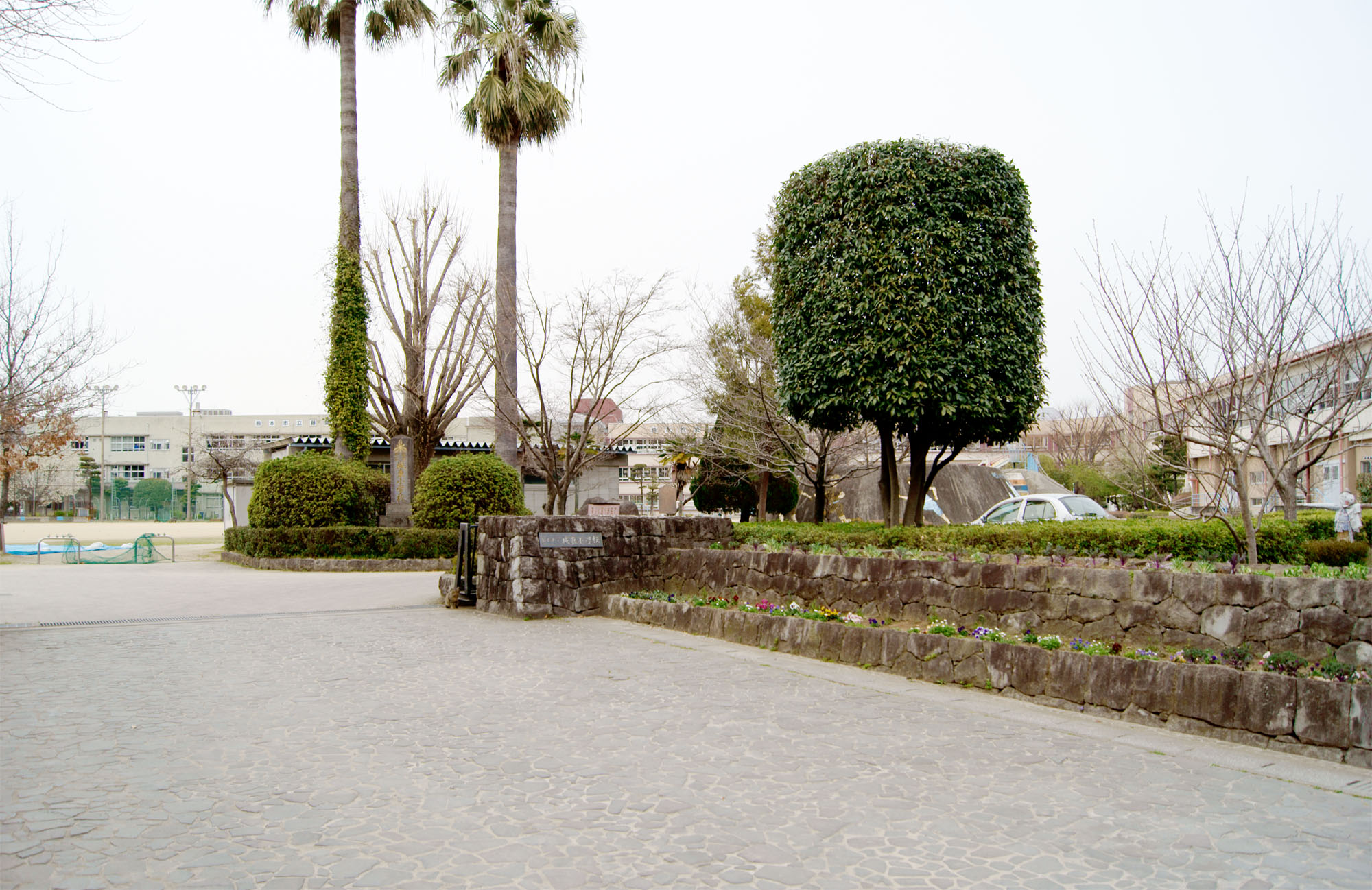 熊本市立城東小学校 校門